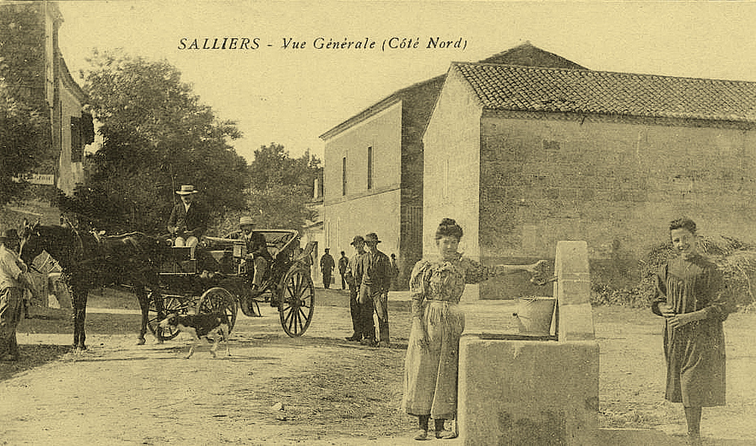 Place de la bascule à Saliers en Camargue